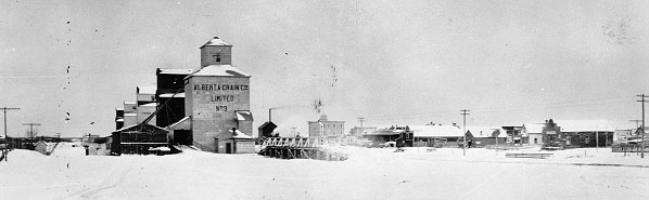 Вид містечка Мондер.